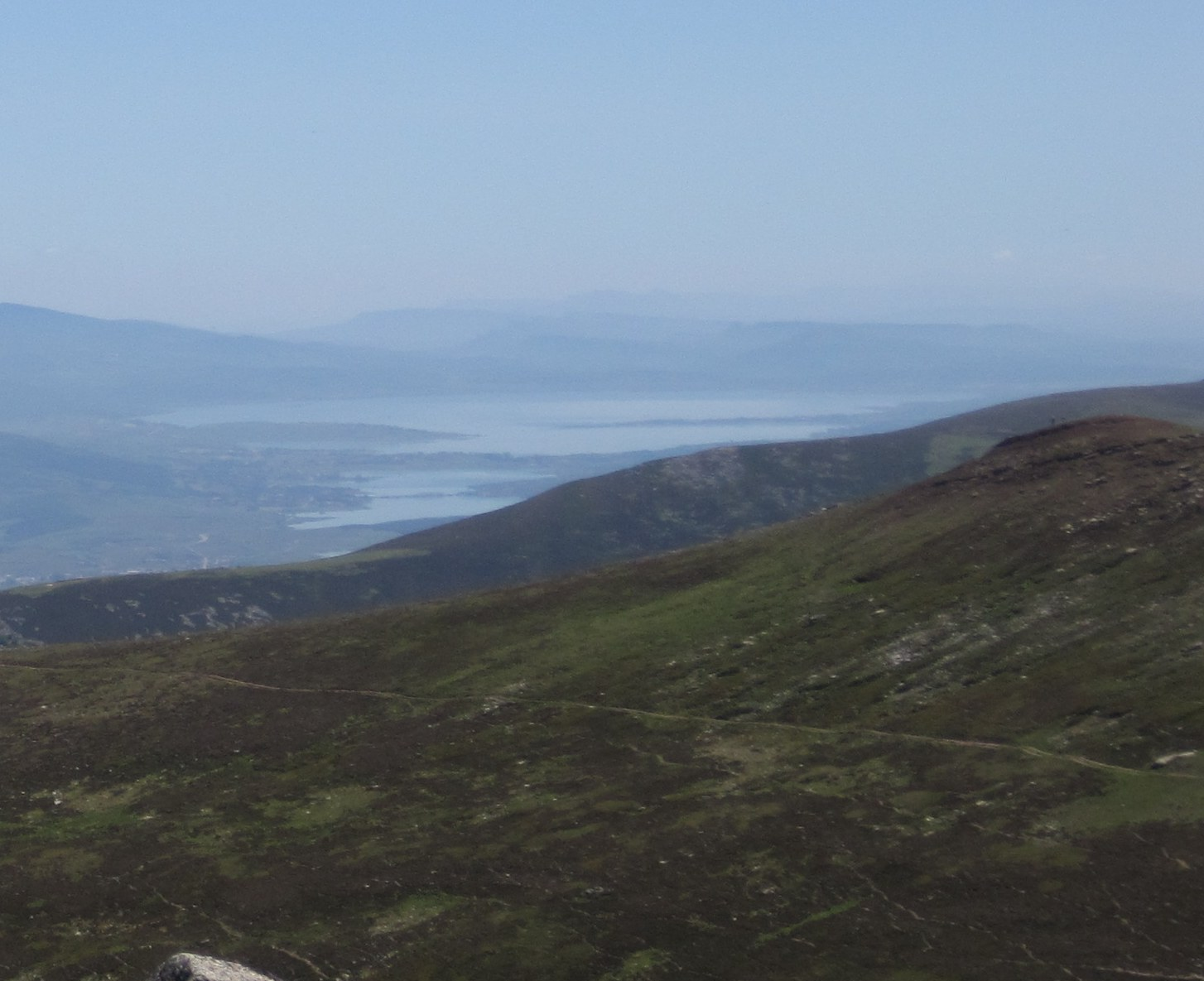 El pantano del Ebro tras el Sestil, desde el Valdecebollas